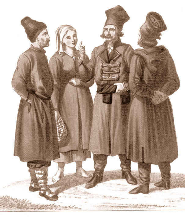 Галицкие русины, литография